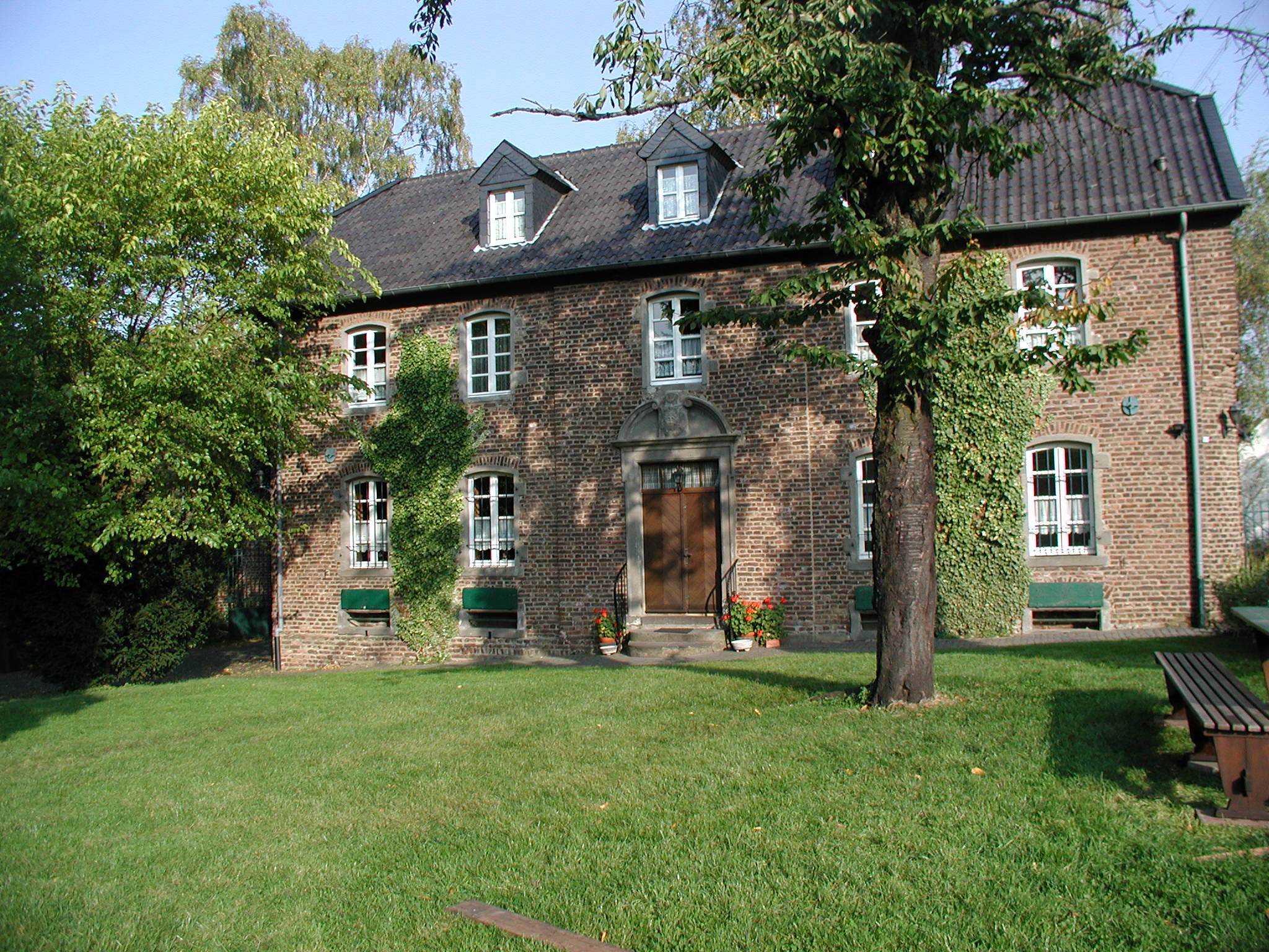 Hürth-Burbach, Kloster Marienborn, Wohnhaus der Äbtissin, später Forsthaus